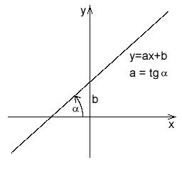 Graf lineární funkce